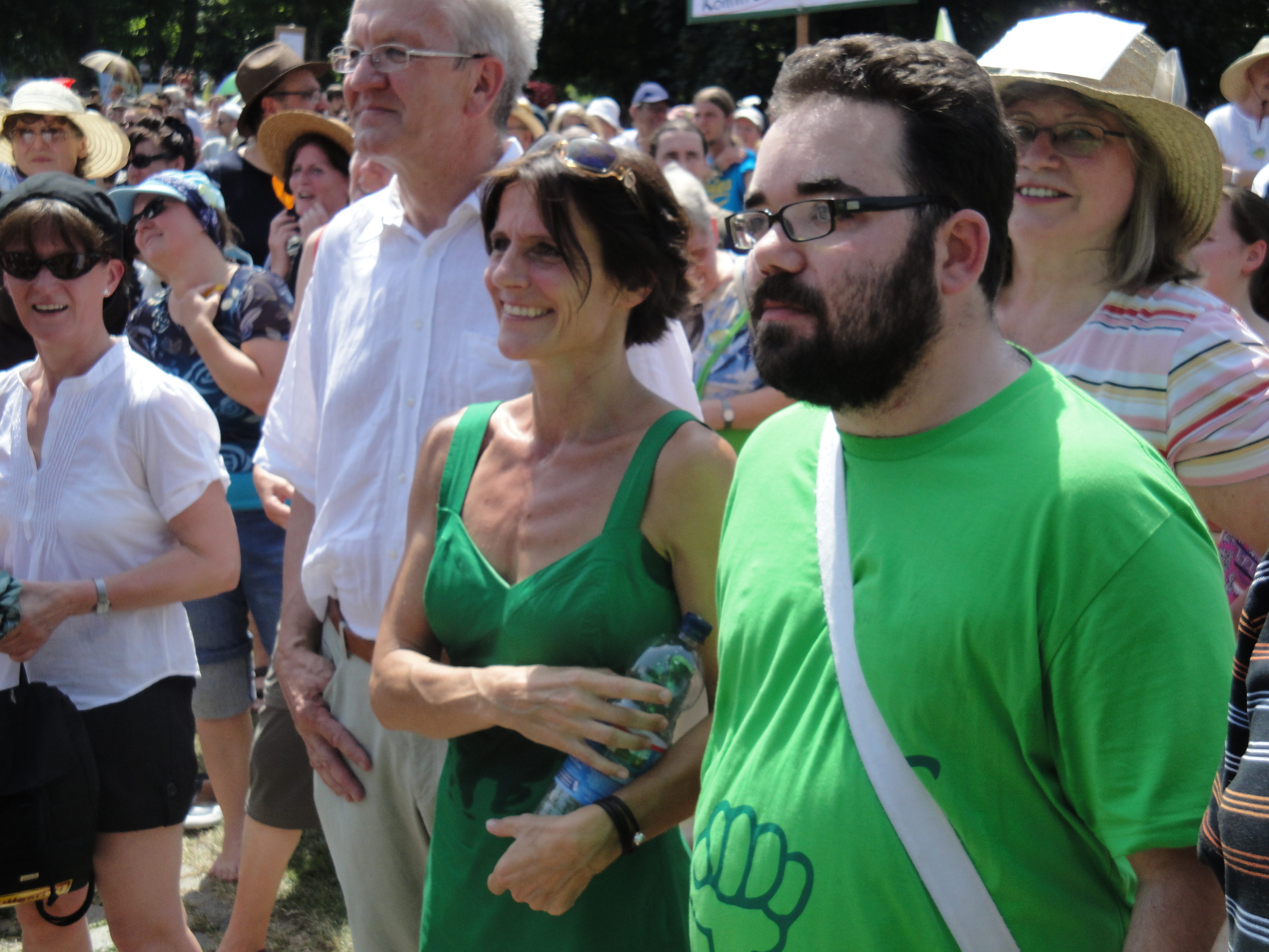 Kundgebung gegen Stuttgart 21 am 10.07.2010. Mitten im Bild (vlnr.): Winfried Kretschmann, Fraktionsvorsitzender und Spitzenkandidat der Grünen im Landtag, Ilka Neuenhaus, MdL für Tübingen, Chris Kühn, Landesvorsitzender von Bündnis 90/Die Grünen Baden-Württemberg.